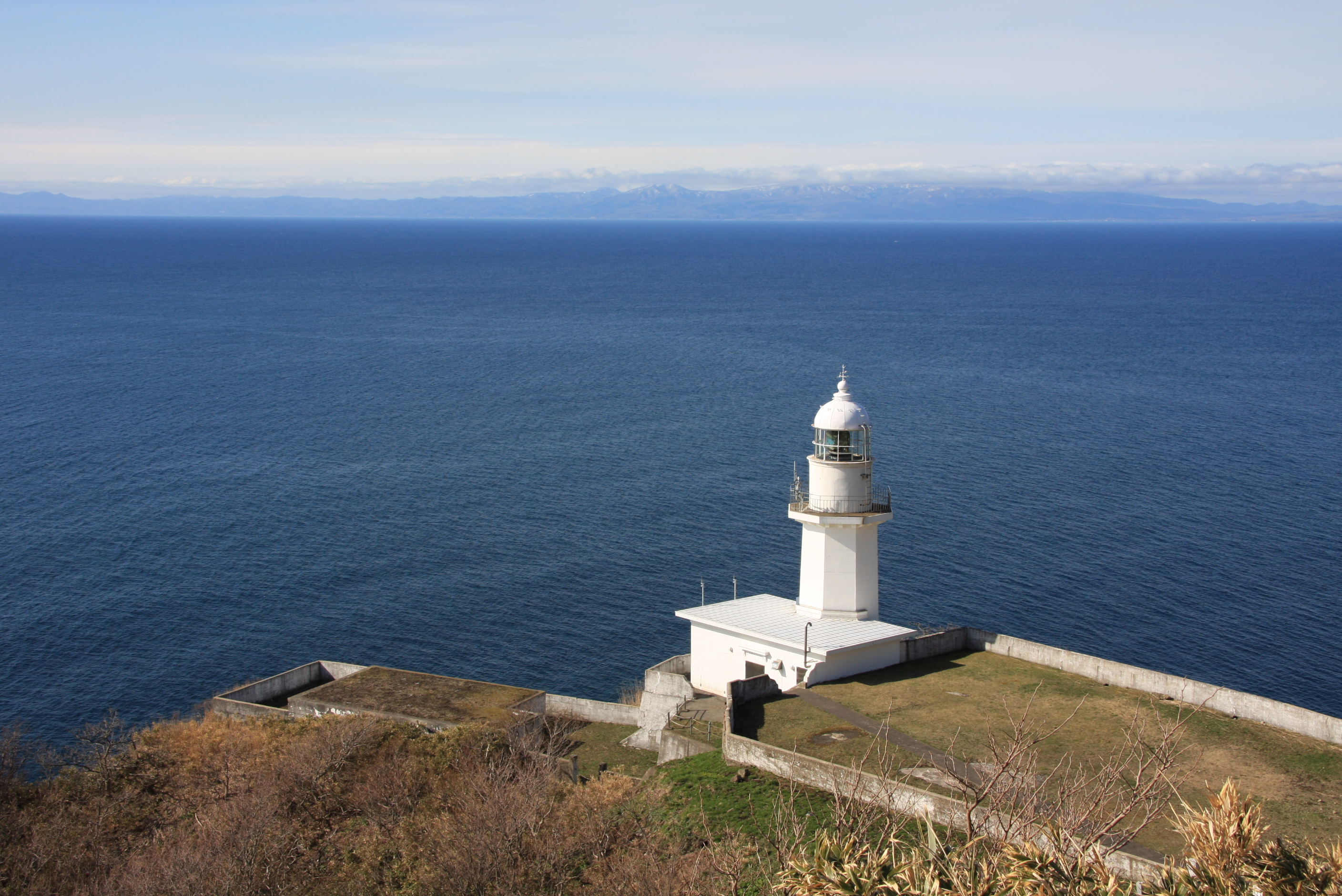 地球岬灯台 室蘭市